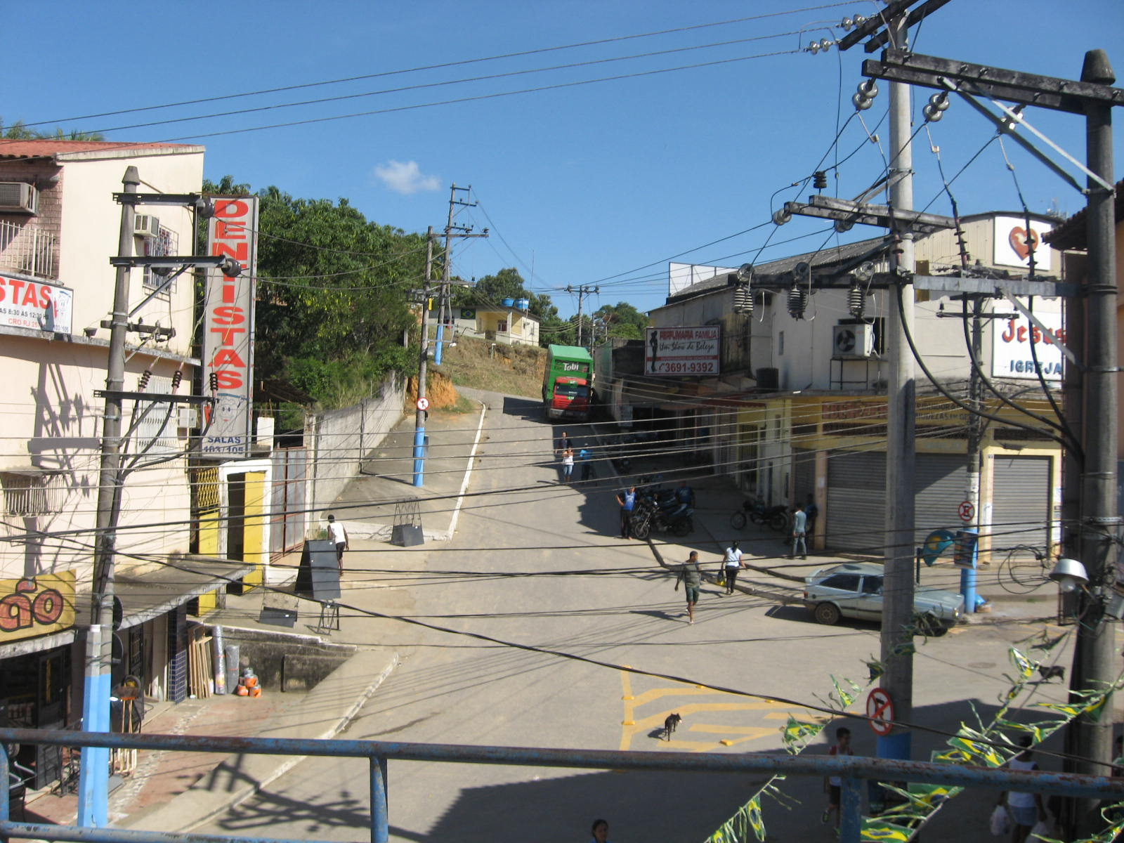 Vista de Engenheiro Pedreira, em Japeri, RJ.